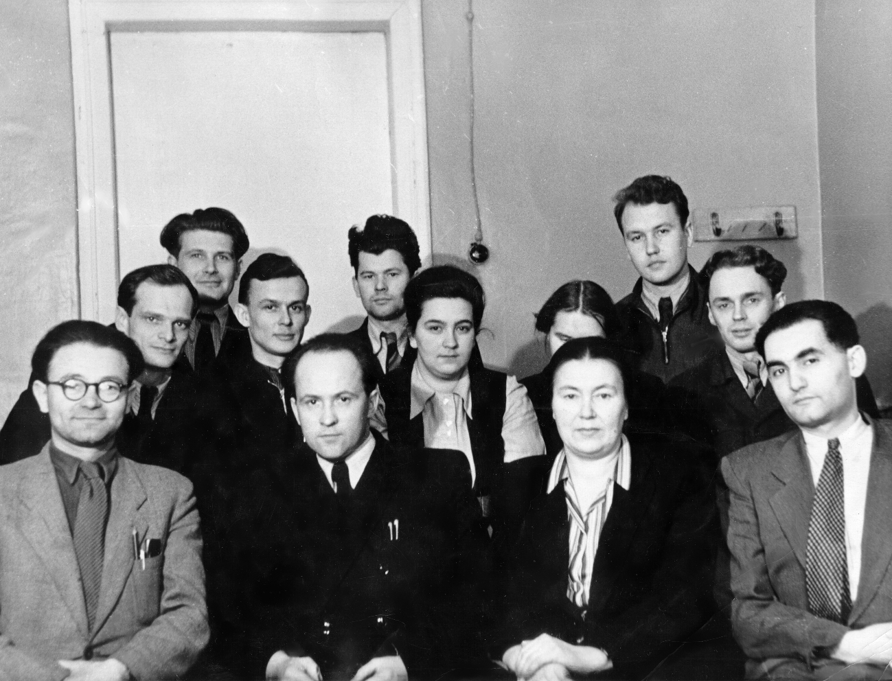 копия фото — Группа учеников профессора А. В. Сторонкина. кафедра теории растворов хмического факультета Ленинградского государственного университета. 1951